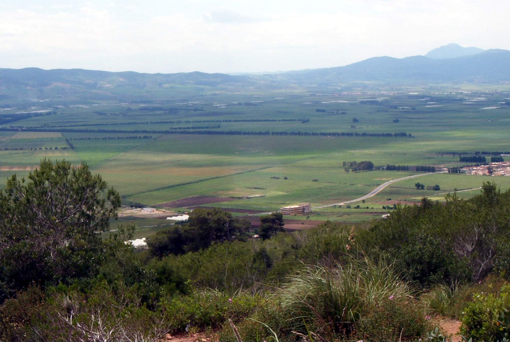 La plaine de la Mitidja dans l'arrière pays algérois